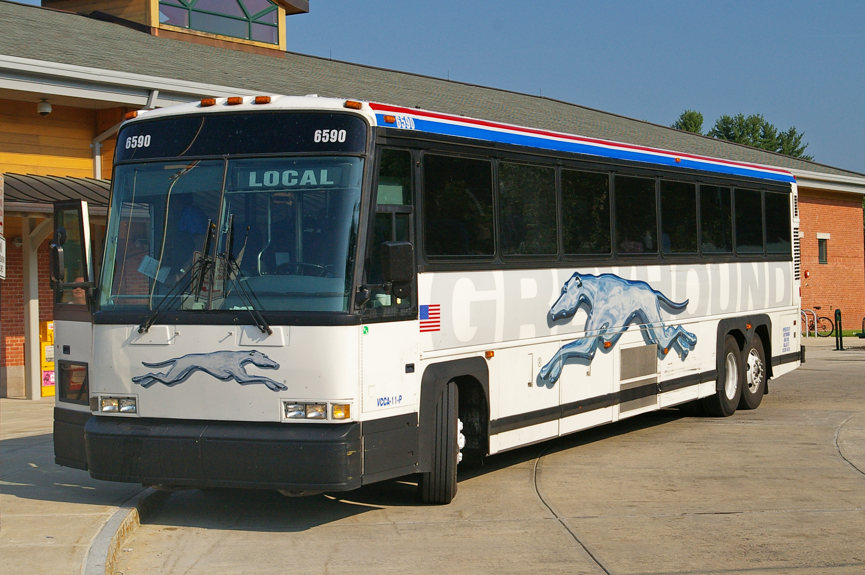 Greyhound-Bus